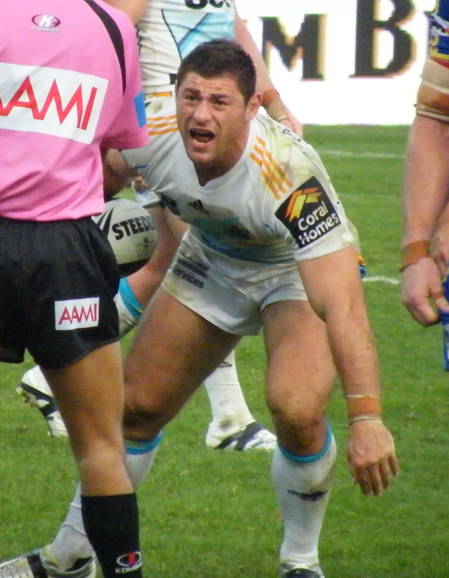 Mark minichiello